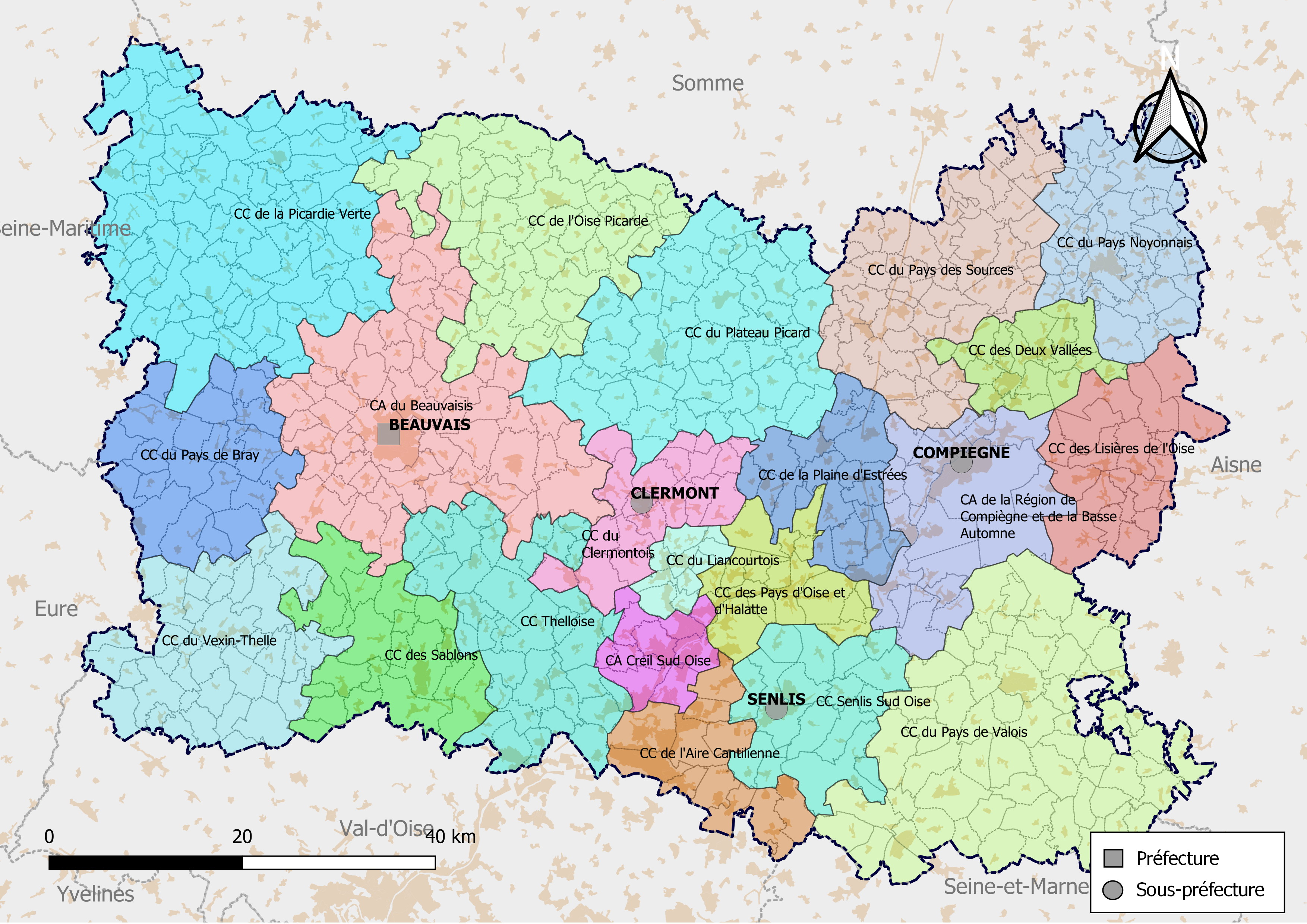 Carte des intercommunalités du département de l'Oise, France. Composition au 1er janvier 2019.